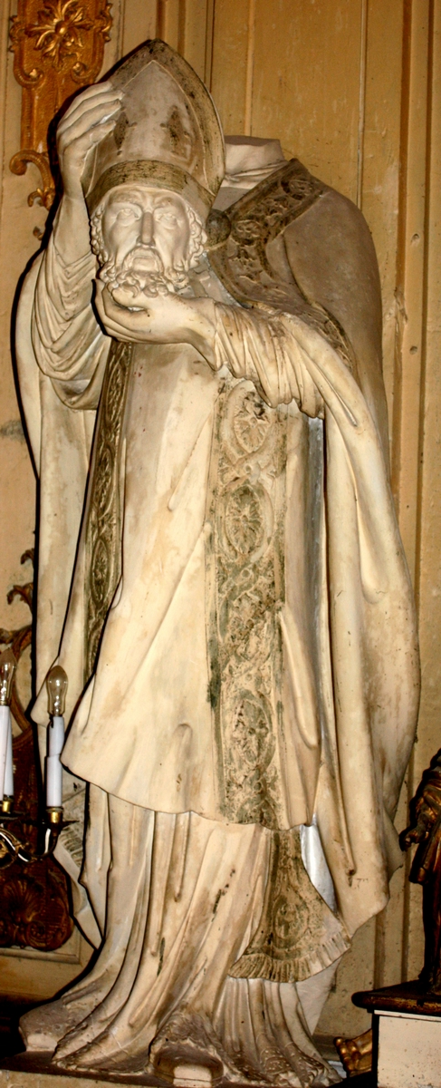 Statue de Saint Denis portant sa tête. (Limite 17e - 18e siècle)